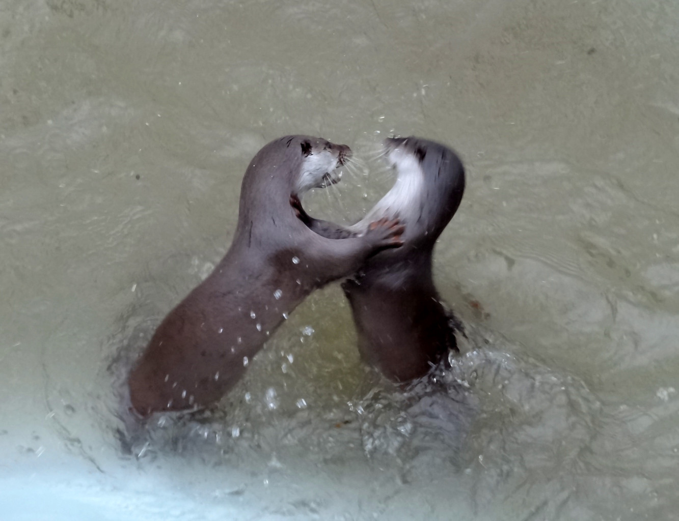 Ogród zoologiczny w Bydgoszczy-Myślęcinku. Wydry